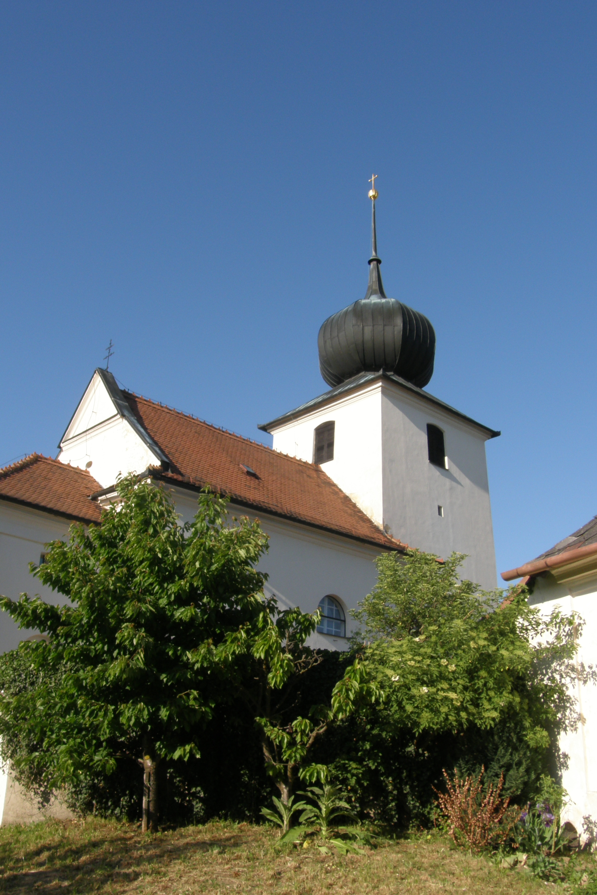 Kostel sv. Maří Magdalény (Sulíkov), Sulíkov